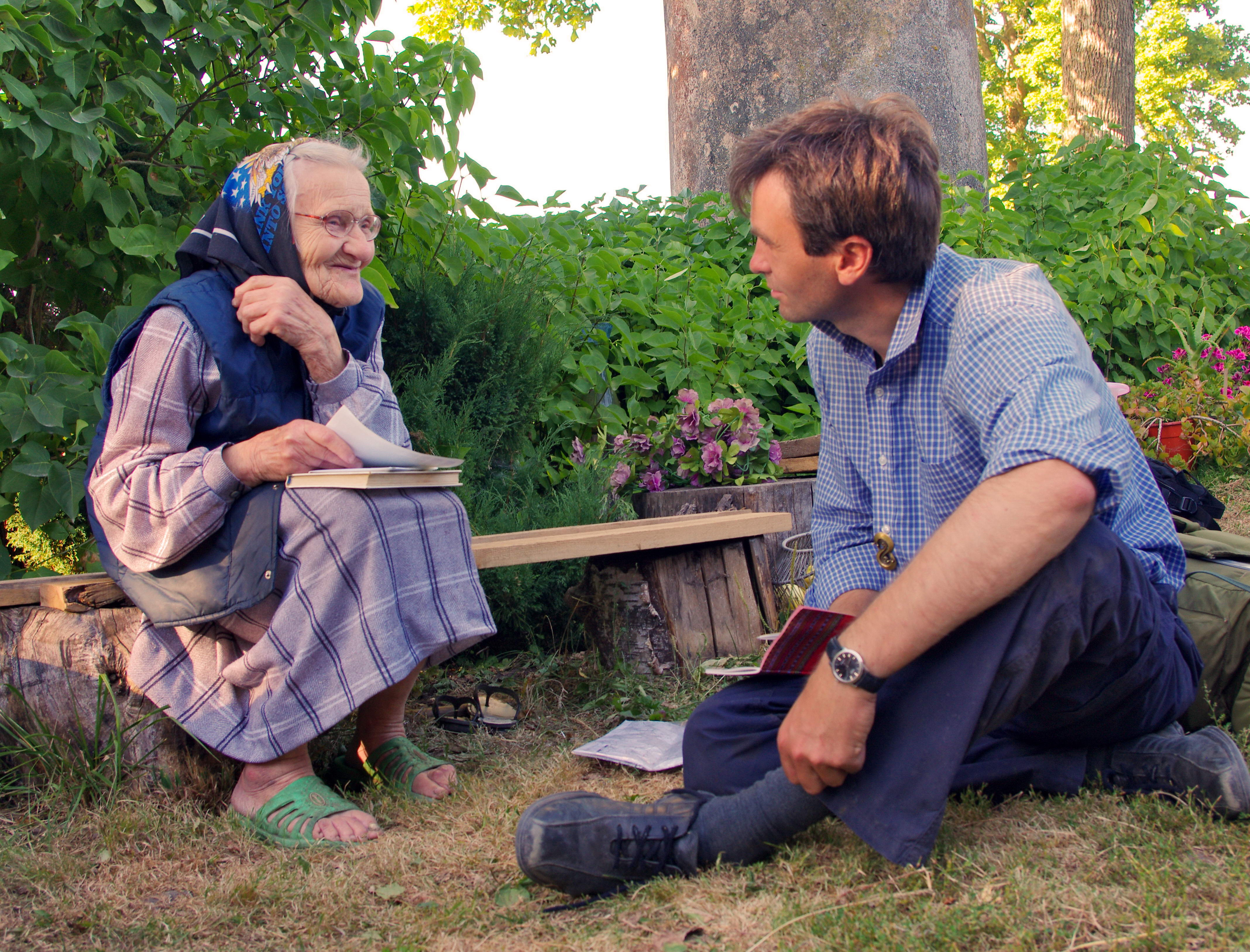 Balandiškio akademinio jaunimo stovyklos akimirka (2015)